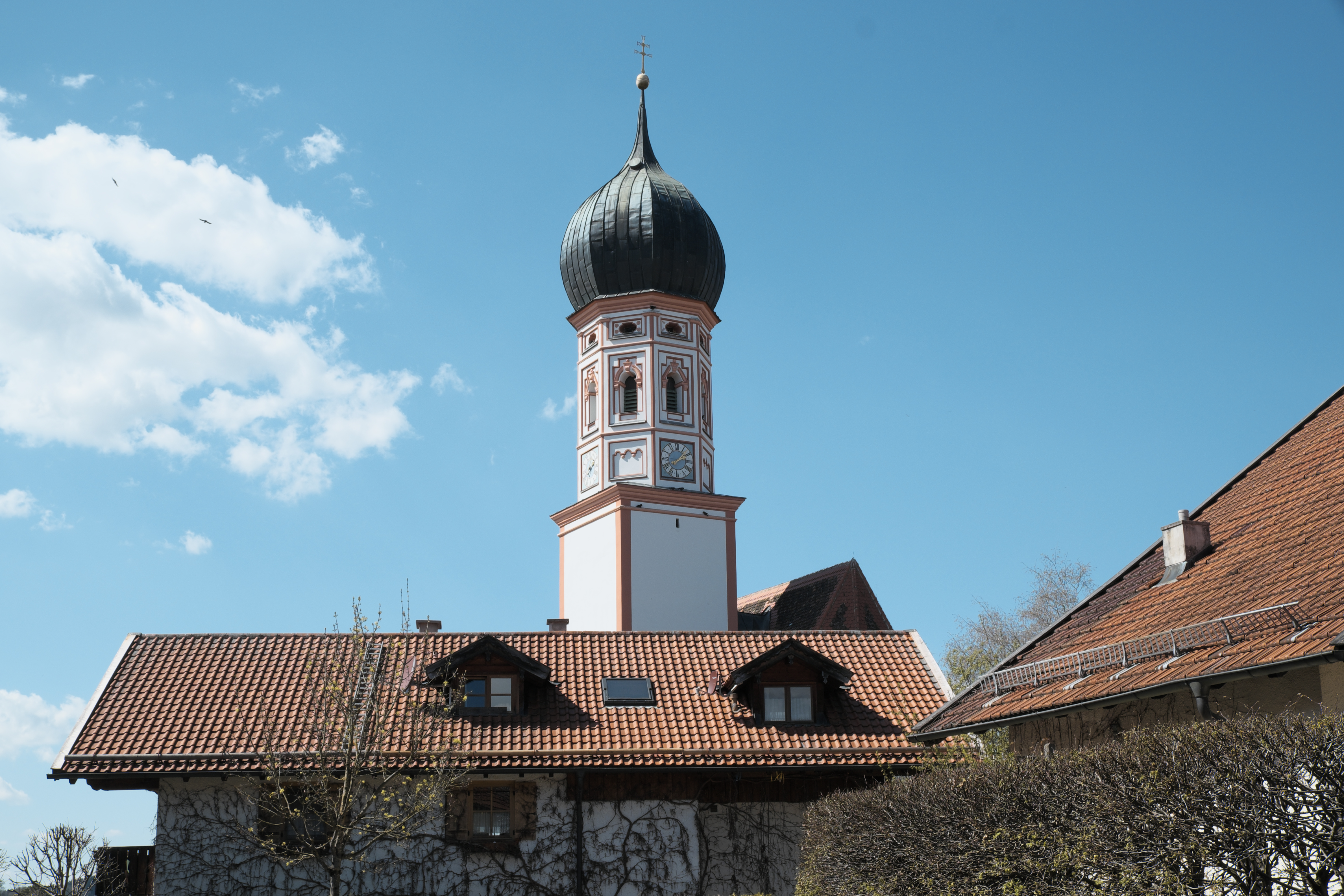 Katholische Pfarrkirche St. Agatha in Uffing am Staffelsee im Landkreis Garmisch-Partenkirchen (Bayern/Deutschland), Turm mit Zwiebelhaube